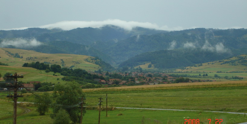 Kászoni táj, Erdély